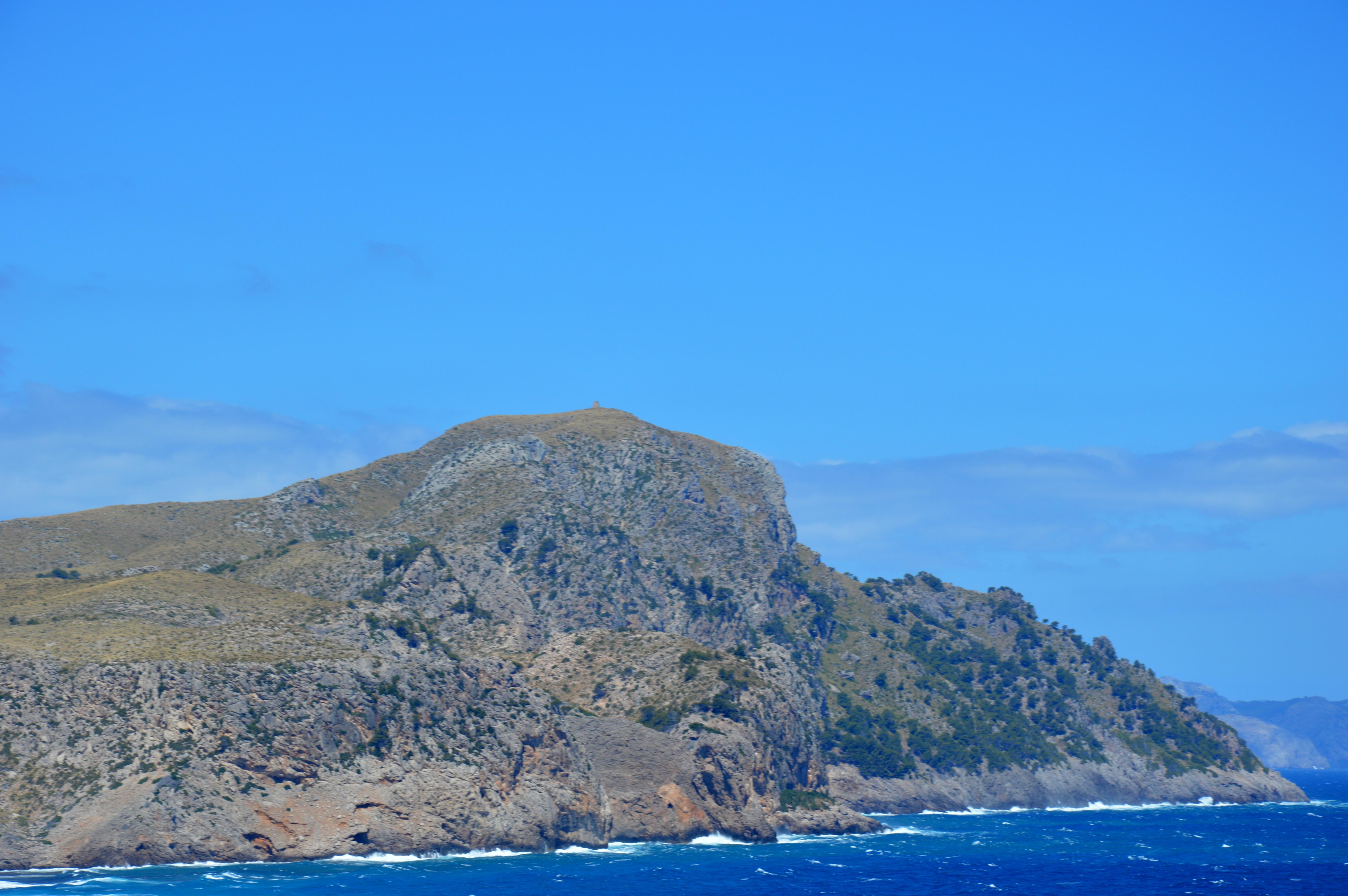 Kap Farrutx